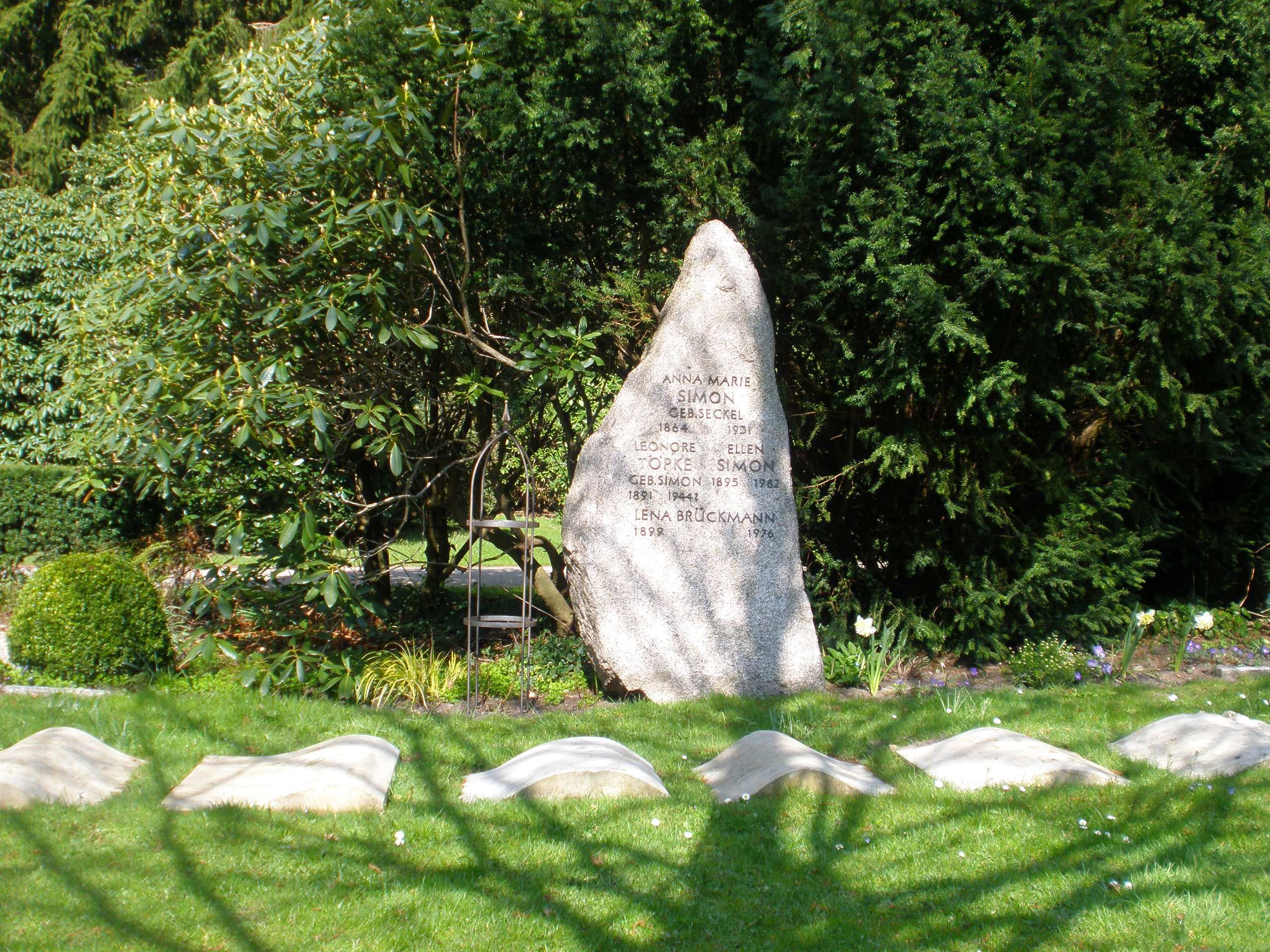 garten der frauen friedhof ohlsdorf